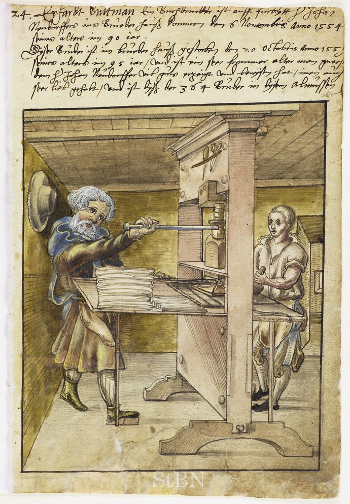 Erhardt (Erhard; Erhardt) Buttman (Buttmann), Buchdrucker Transkription und weitere Informationen